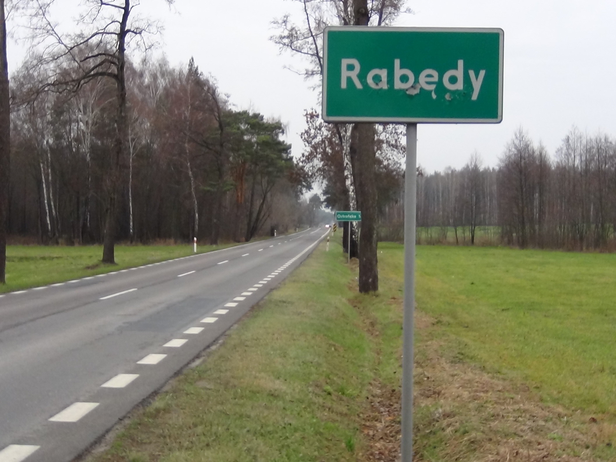 Widok od strony Borowców